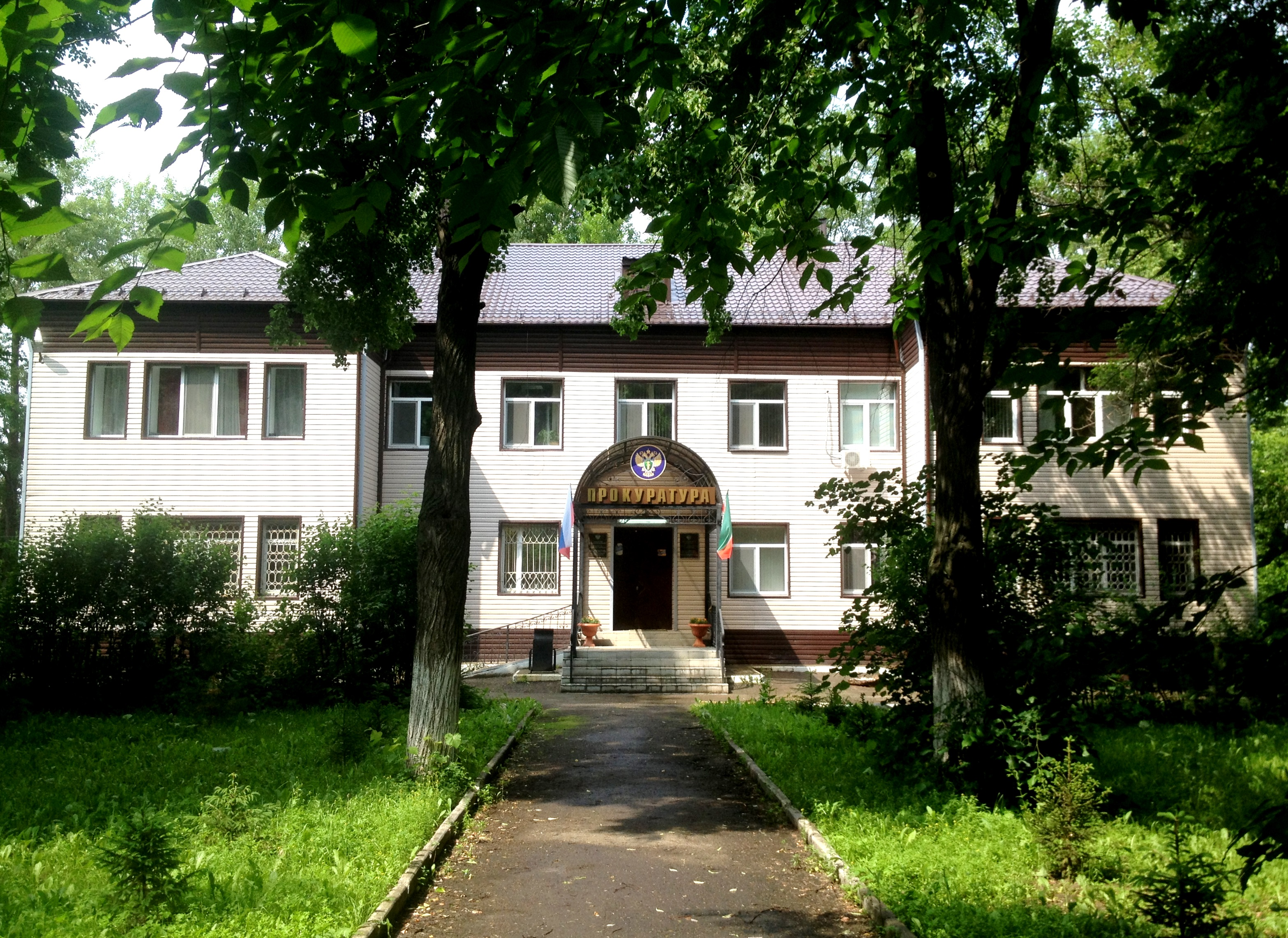 Прокуратура Авиастроительного района города Казани (ул. Олега Кошевого, дом 8 а).